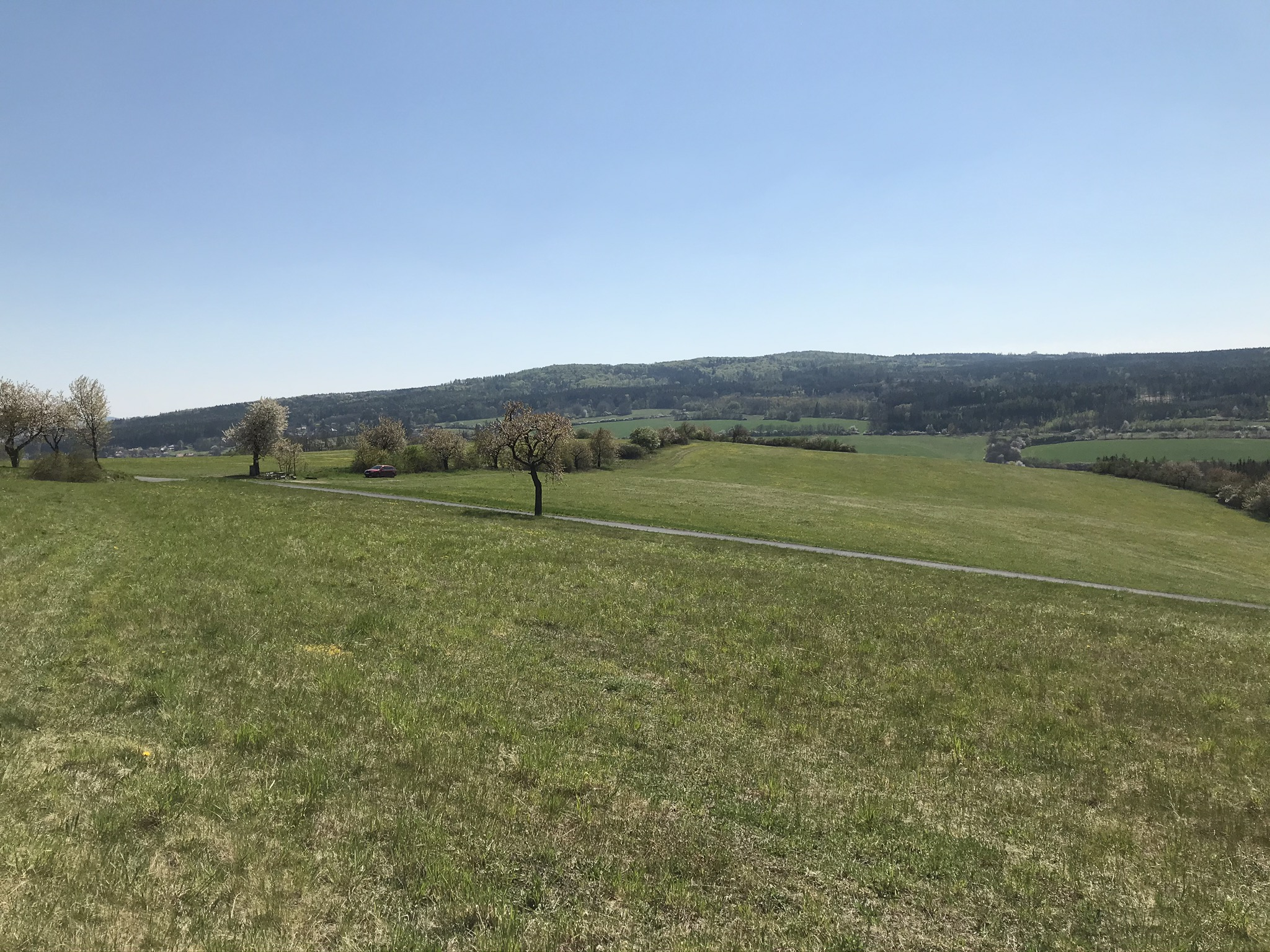 Pohled na Bukovou horu od východu z vrchu Oběšený u Blovic